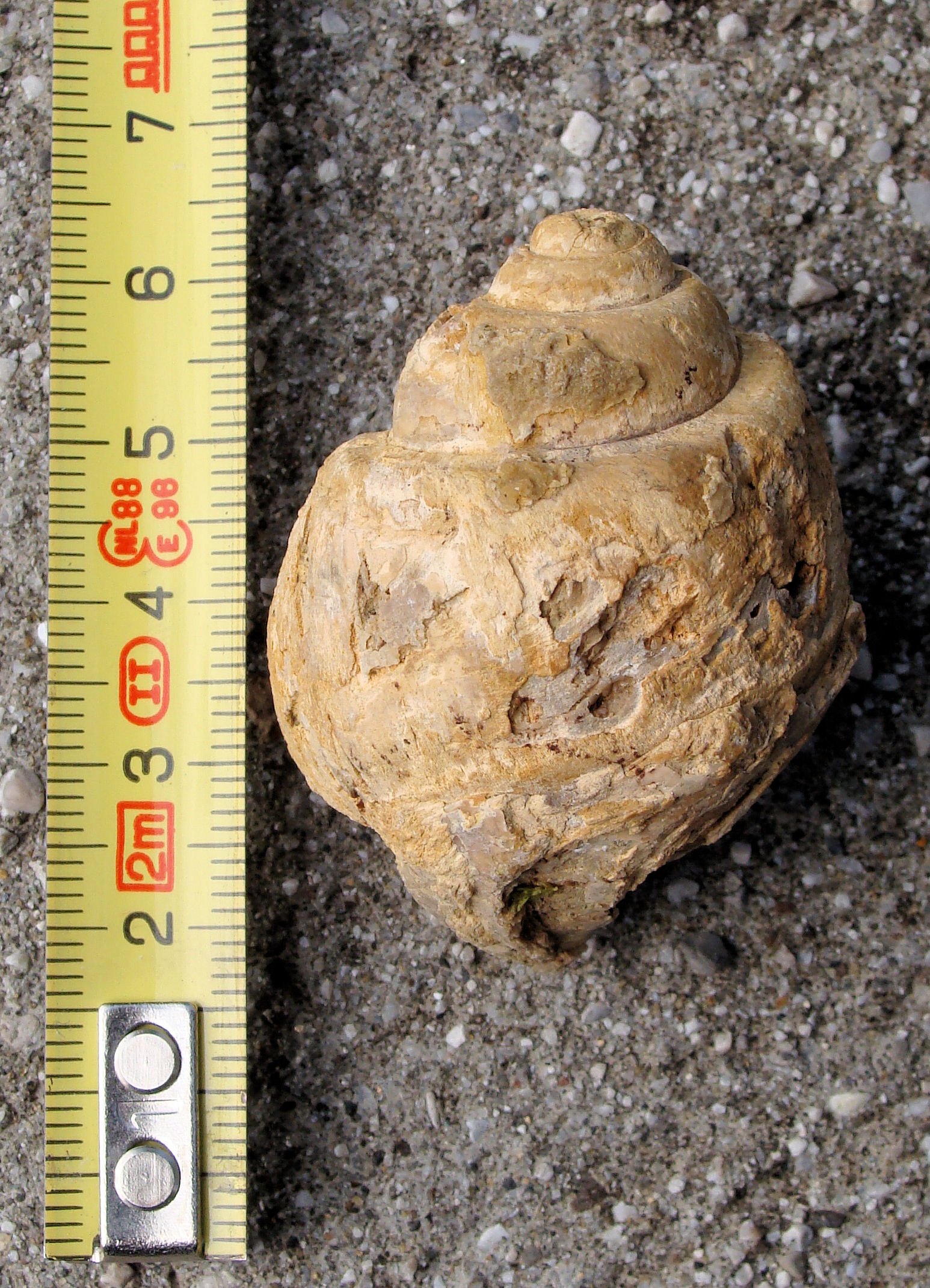 Fossile appelé Amaurellina trouvé à Monteaperta (Frioul-Vénétie Julienne) en Italie (Mai 2011)